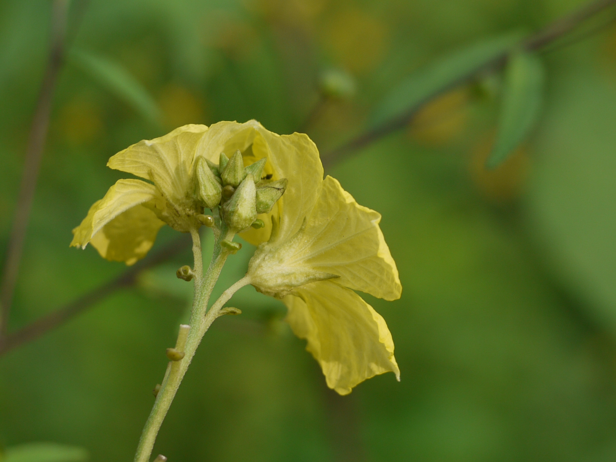 Cucurbitaceae (pumpkin, or gourd family) » Luffa acutangula var. amara LUF-fuh -- from the Arabic word lufah or lufa a-kew-TAN-gu-luh or a-kew-TAN-gyoo-luh -- having sharp angles a-MAH-ruh or a-MAR-uh -- bitter to the taste commonly known as: bitter luffa, wild luffa, wild ribbed gourd, wild ridge gourd • Bengali: তিতা ধুন্দুল tita dhundul • Gujarati: કડવી ઘિસોડી kadvi ghisodi • Hindi: बन तुरई ban turai • Kannada: ಕಹಿಹೀರೆಯ ಬಳ್ಳಿ kahihireya balli • Konkani: कोडु घोसाळे kodu ghosaale • Malayalam: കാട്ടു പീച്ചില്‍ kattu peechil, കാട്ടു പീച്ചിങ്ങ kattu peechinga • Marathi: दिवाळी divali, कडूदोडकी kadu-dodaki • Sanskrit: जालिनी jalini, तिक्त कोषातकी tikta-koshataki • Tamil: ஆகாசவேணி akaca-veni, பேய்ப்பீர்க்கு pey-p-pirkku, தித்தகோசாதகி tittakocataki • Telugu: అడవి బీర adavi bira, చేదు బీర chedu bira, వెర్రి బీర verri bira • Urdu: بن ترئي ban turai Endemic to: India (peninsula and Bengal) References: Indian Herbal Cure • ENVIS - FRLHT • DDSA